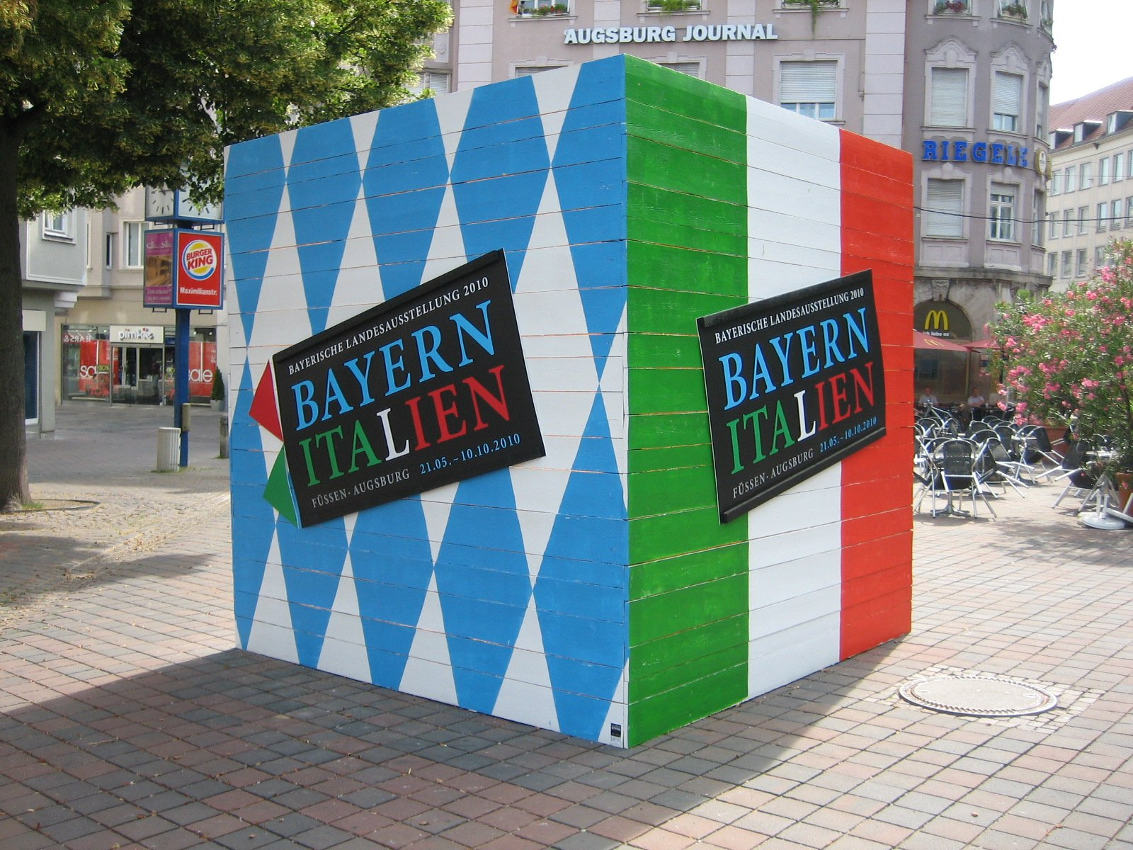 Königsplatz in Augsburg. Werbung für die Landesausstellung "Bayern—Italien" 2010 im Augsburger Textil- und Industriemuseum. Der stark frequentierte Königsplatz ist häufig ein Ort der Werbung für besondere Veranstaltungen.